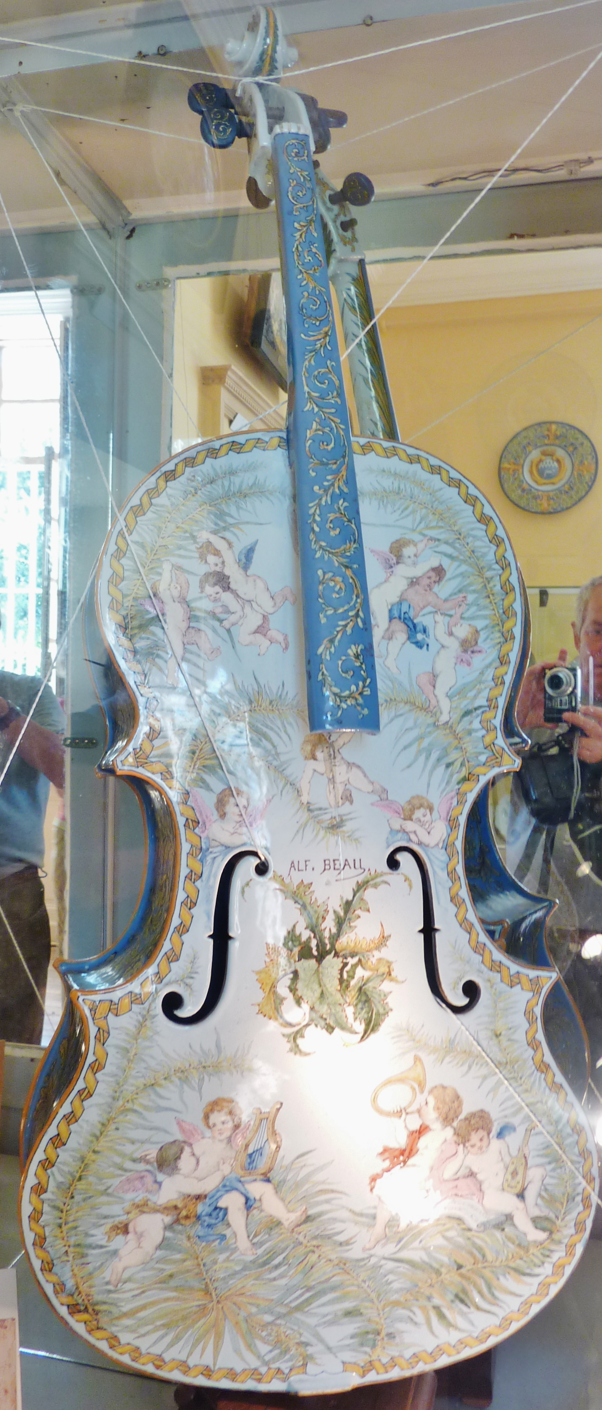 Alfred Beau : violoncelle en faïence (faïencerie Porquier, ce violoncelle obtint la médiale d'argent à l'exposition universelle de 1878, manoir de Kerazan en Loctudy, fondation Astor). Ce violoncelle en faïence est considéré comme le plus beau existant au monde et Alfred Beau fit 16 tentatives avant de réussir sa fabrication